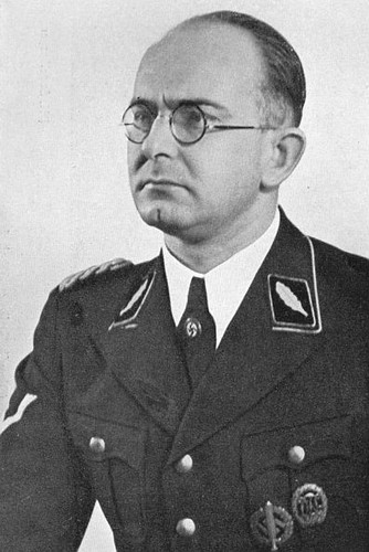 Franz Six